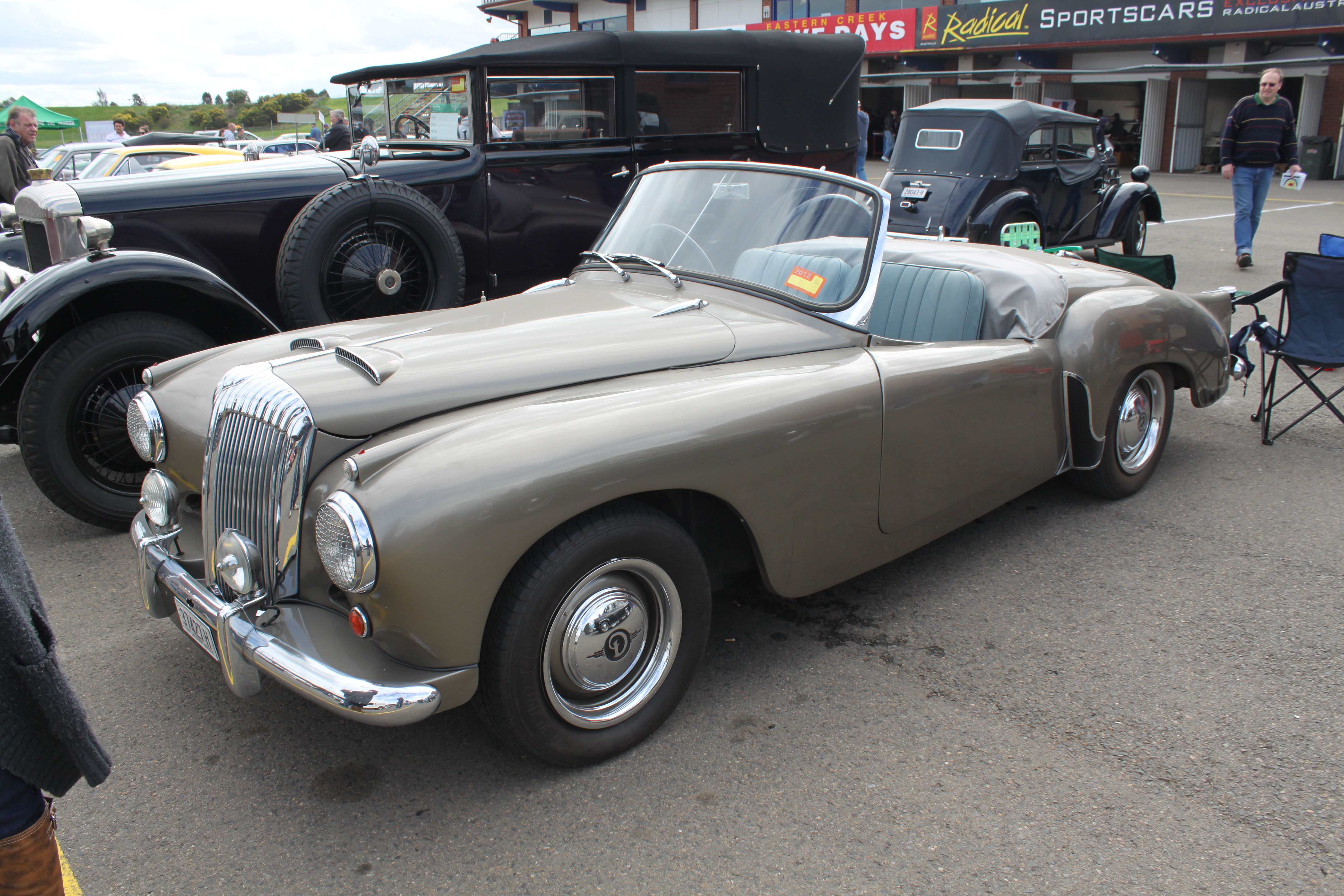 Daimler Conquest DJ254